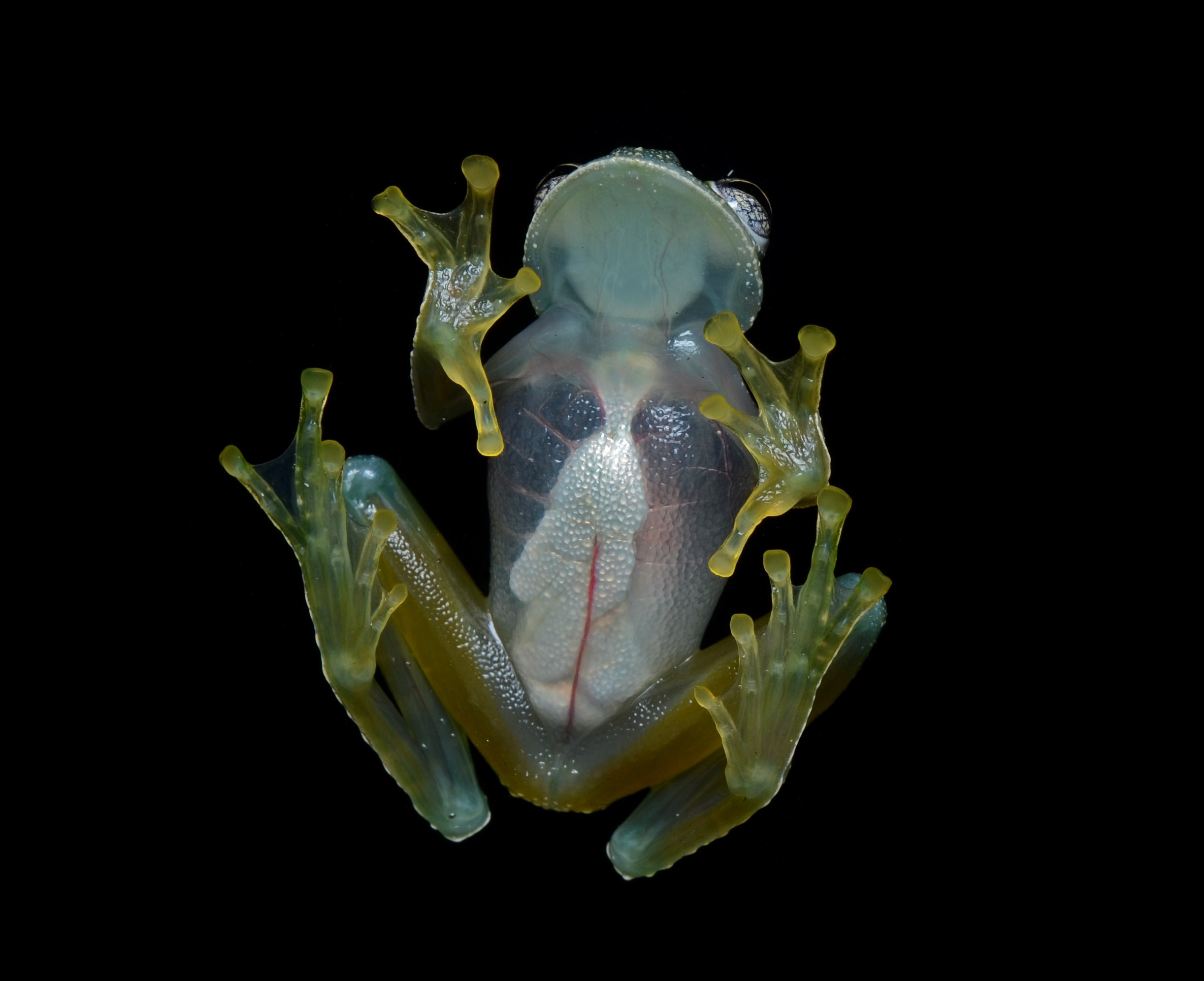 Centrolenidae: Cochranella pulverata; ventral view